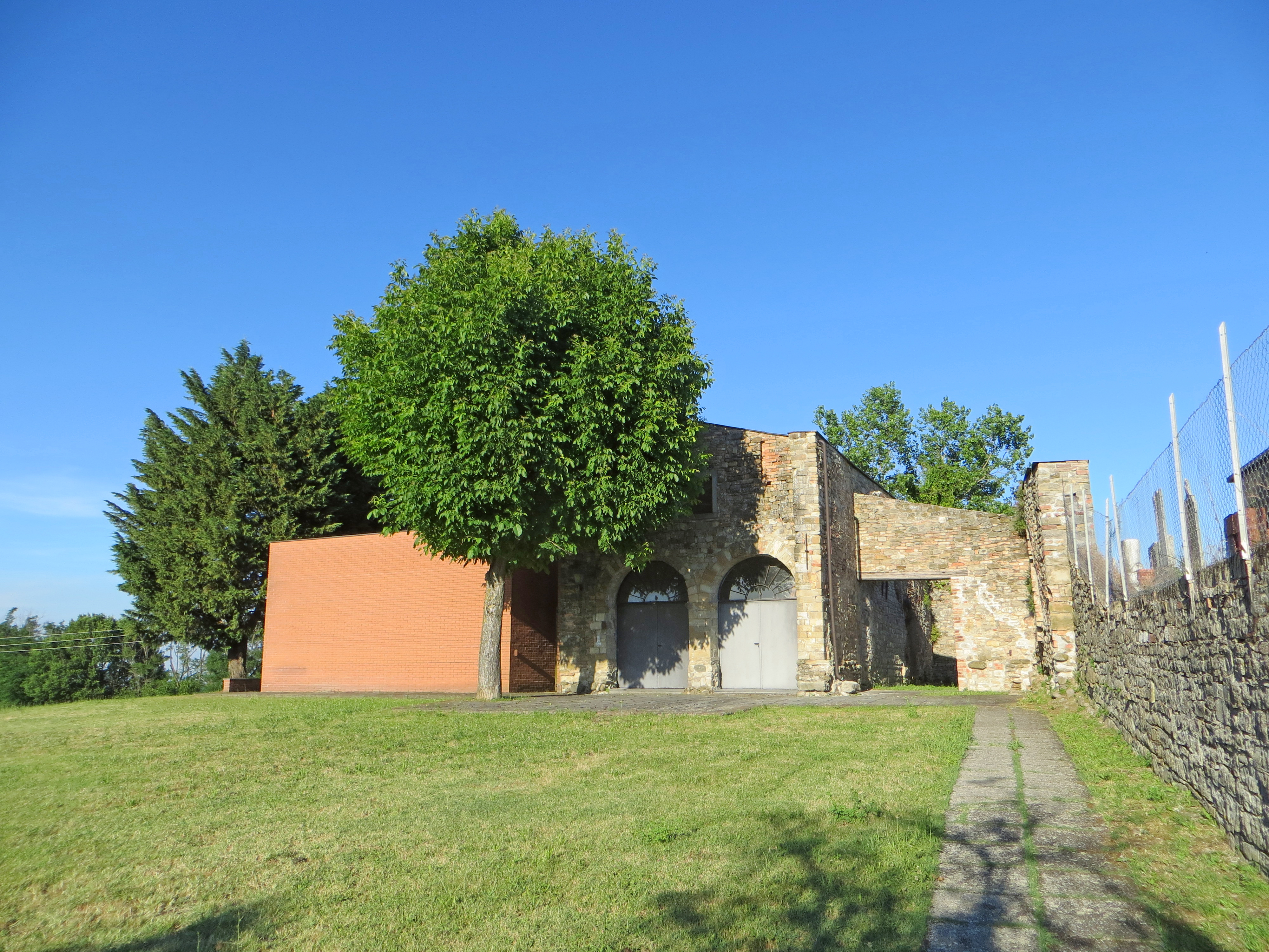 Pieve di San Martino (Arola, Langhirano) - facciata